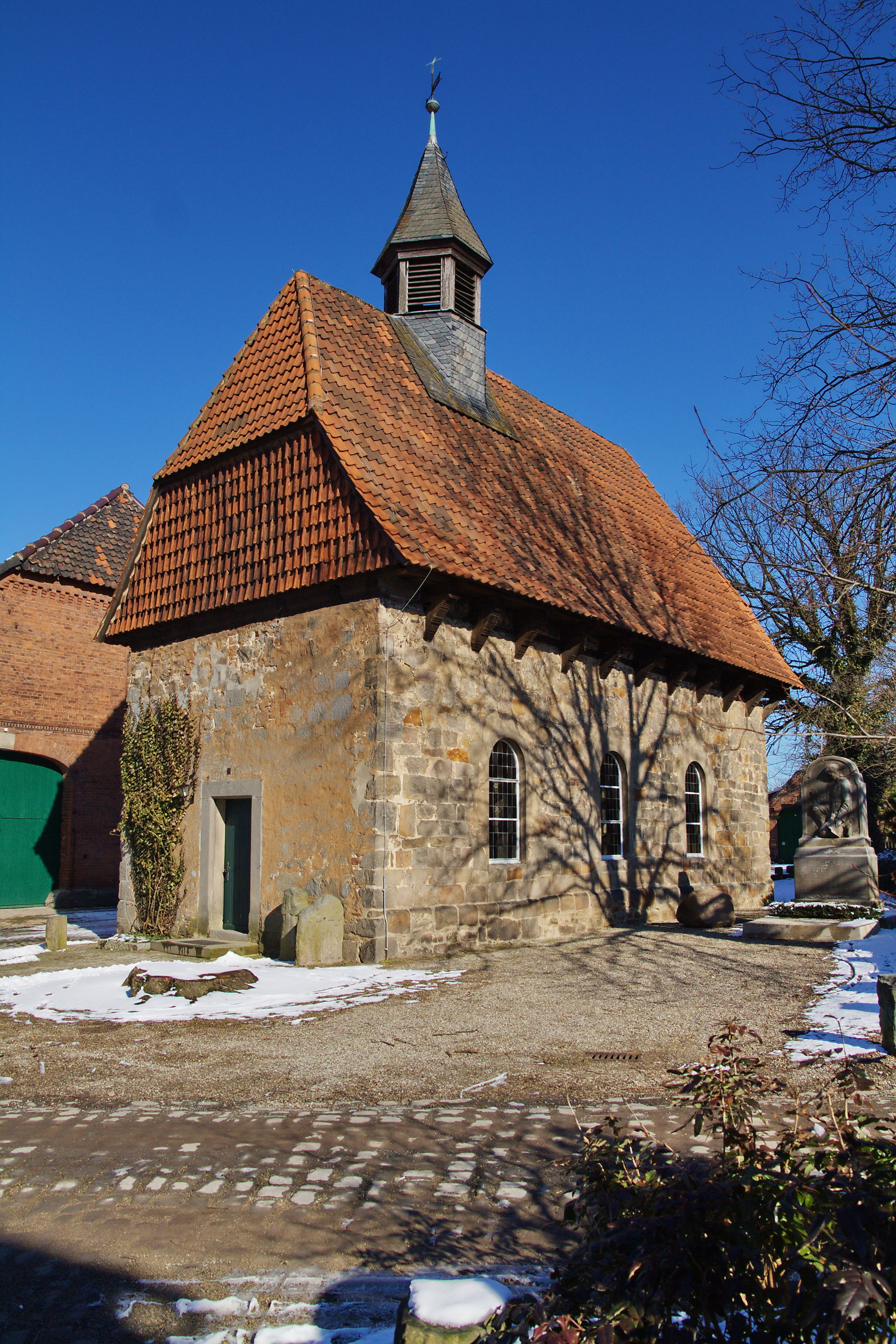 Kapelle in Hemmingen-Westerfeld (Hemmingen), Niedersachsen, Deutschland